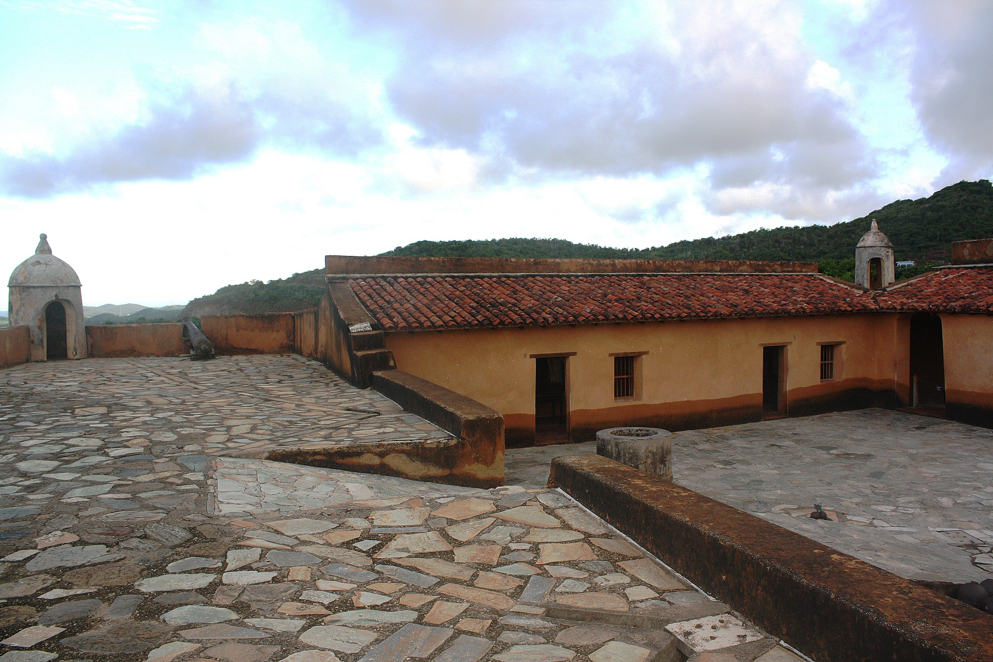 Castillo Santa Rosa, La Asunción, Margarita, Venezuela